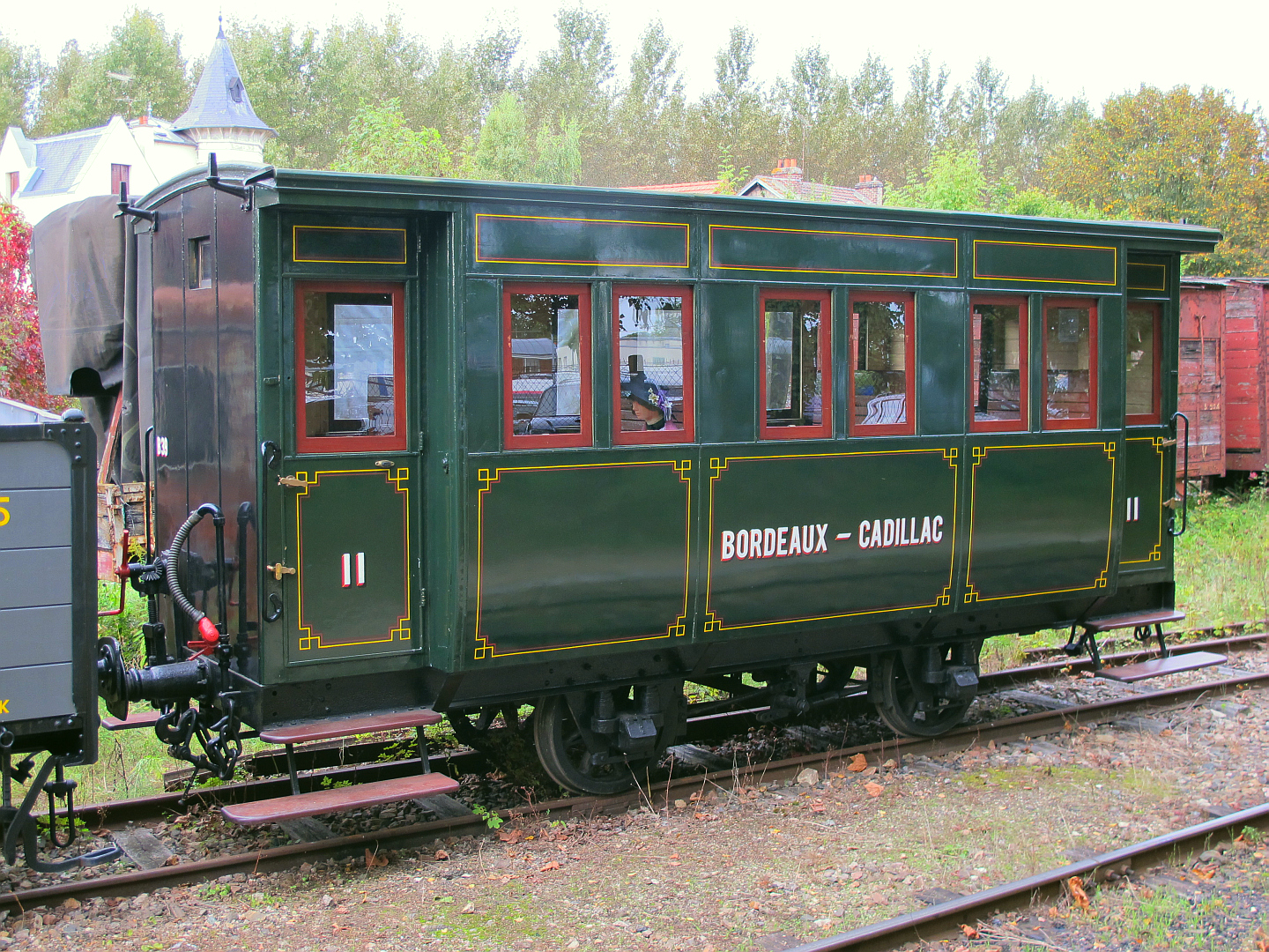 La voiture N° B39 du tramway de Bordeaux à Cadillac (TBC), au Musée des tramways à vapeur et des chemins de fer secondaires français, à Butry-sur-Oise le 5 octobre 2013.